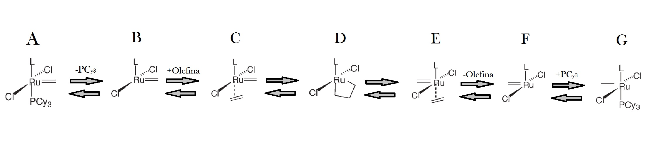 Figura 1.